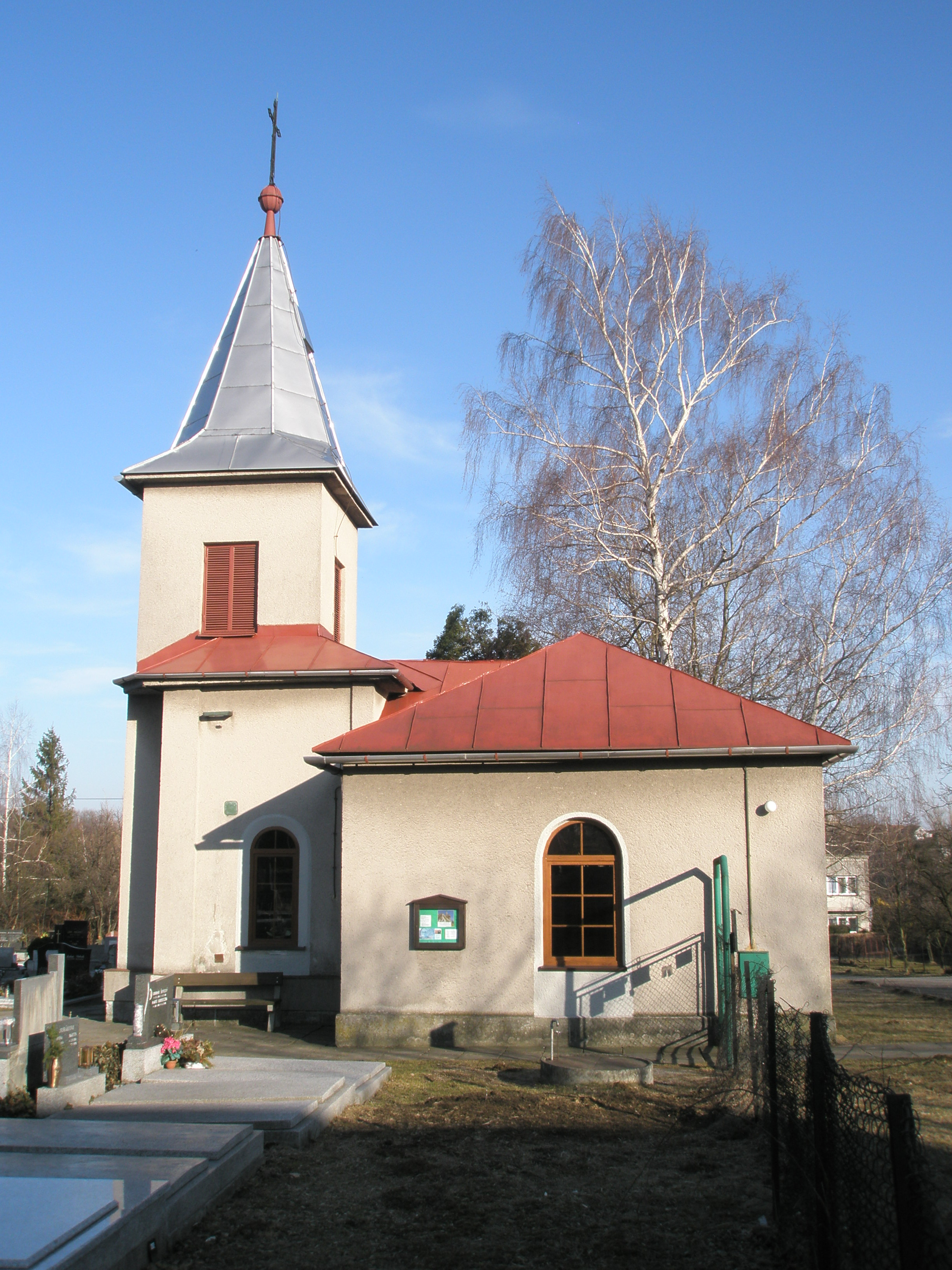 Evangelická hřbitovní kaple v Hnojníku